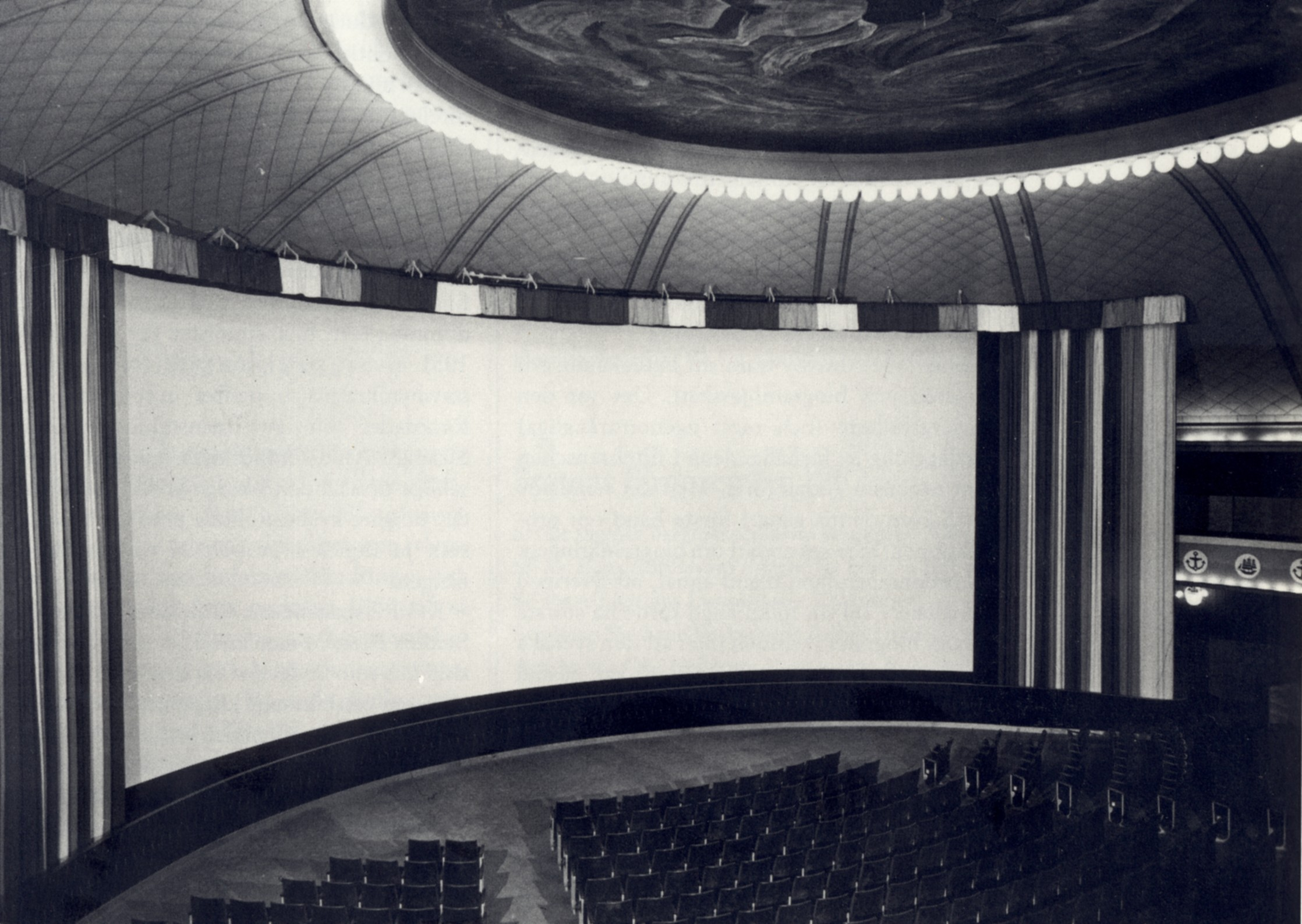 Vinterpalatset i Stockholm med nya cinerama-duken